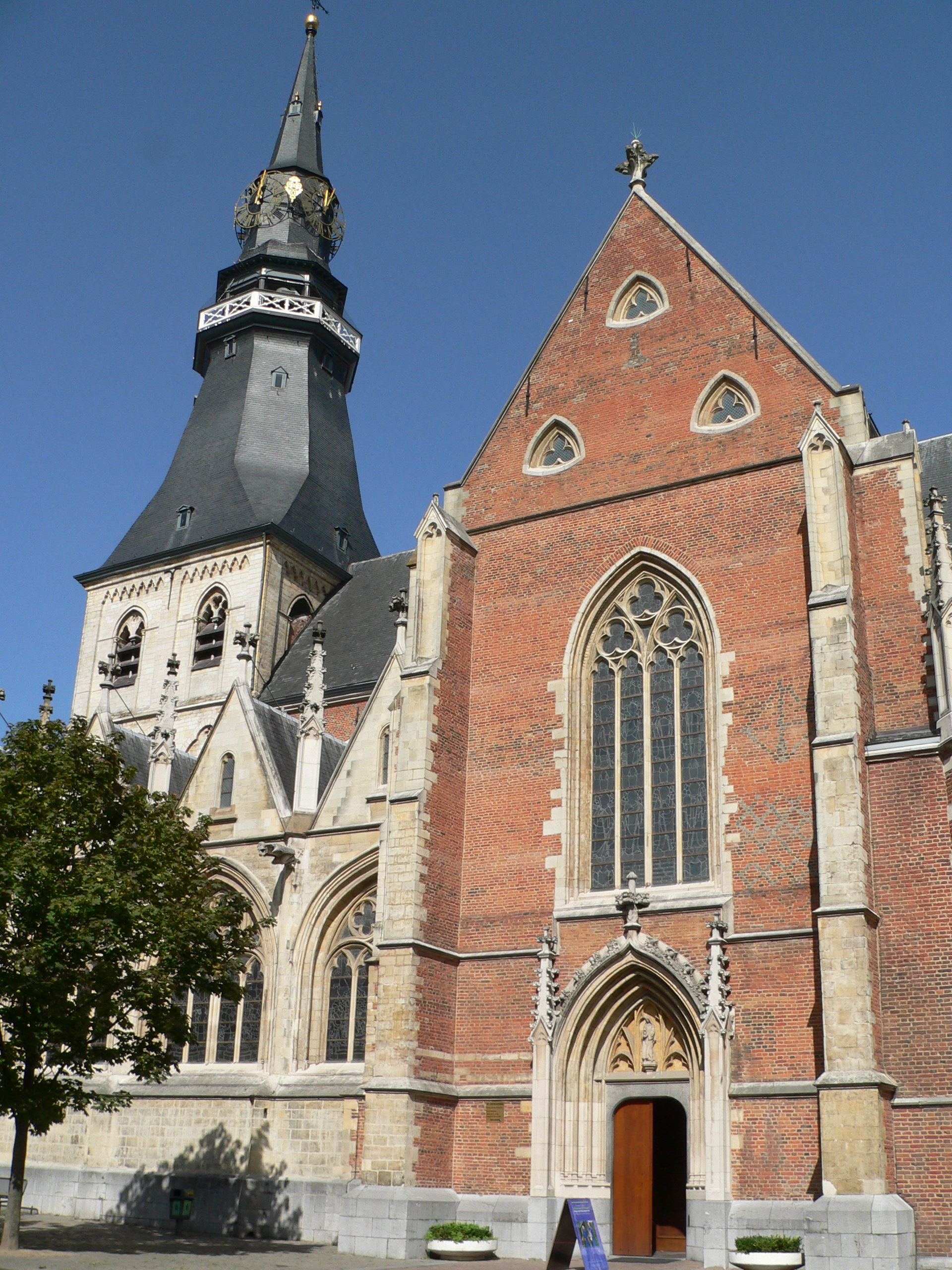 Westturm und Querschiff der Sint-Quintinus-Kathedrale in Hasselt - Belgien